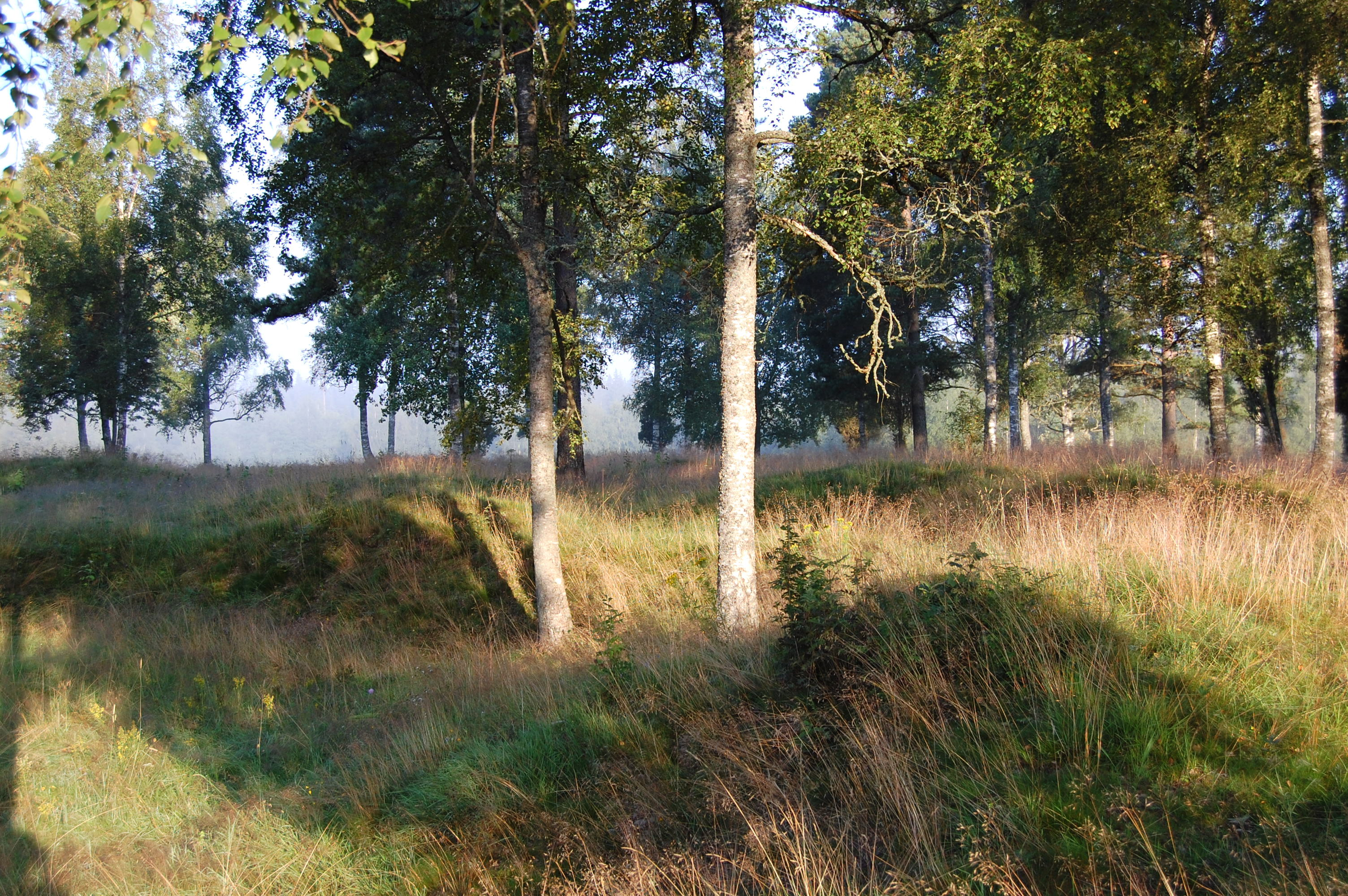 Femtinge gravfält, RAÄ-nummer Norra Ljunga 132:1